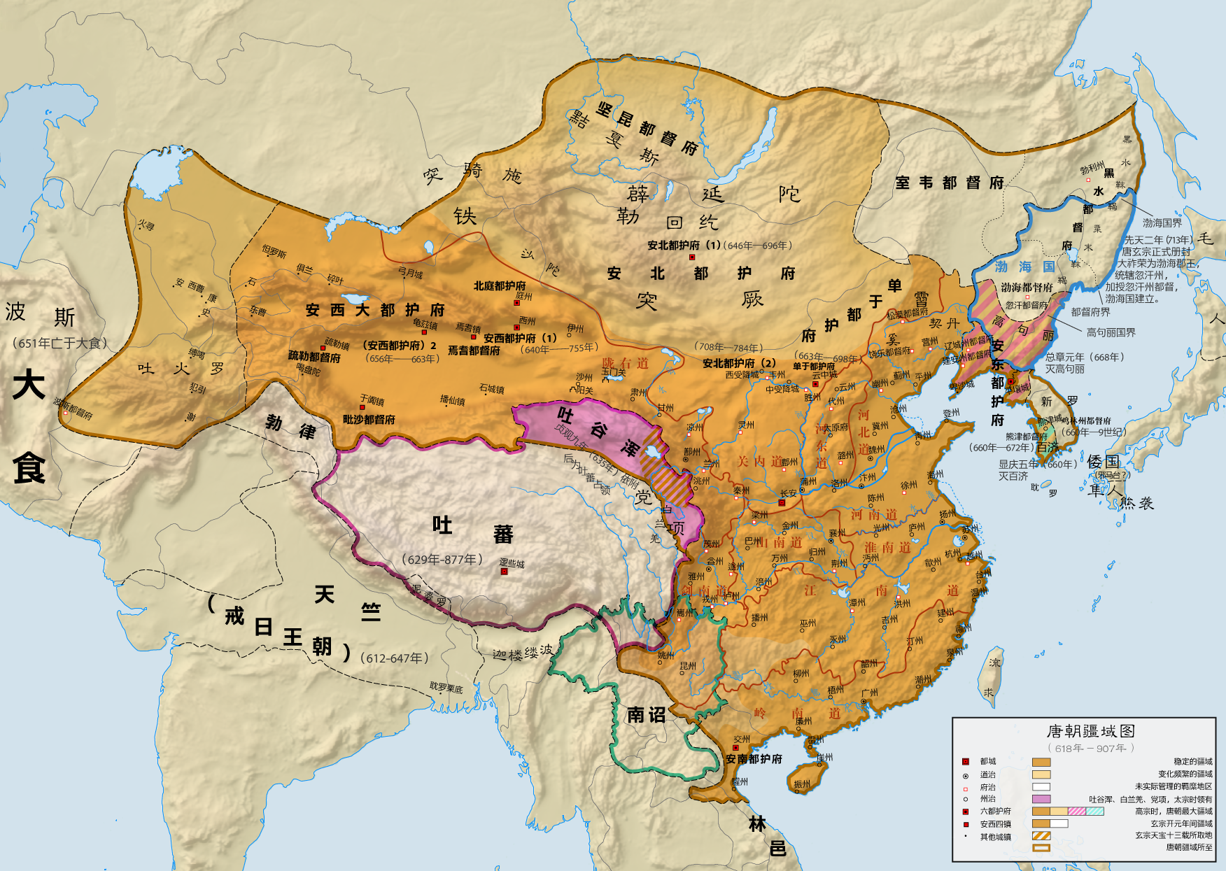 唐疆